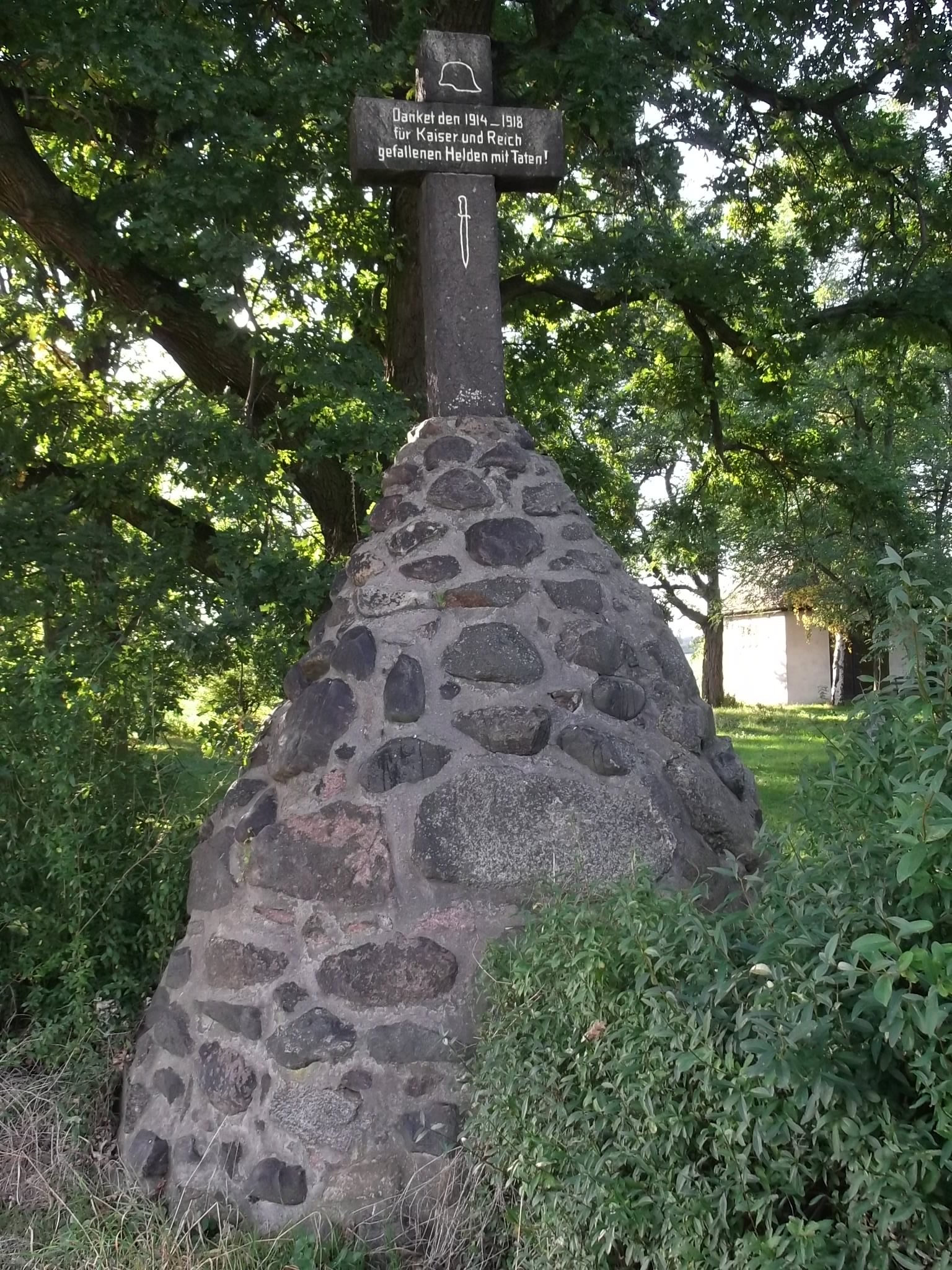 Ort: Kleinkugel ; Gemeinde: Kabelsketal ; Straße: Am Umspannwerk - Friedhof ; Objekt: Soldatendenkmal